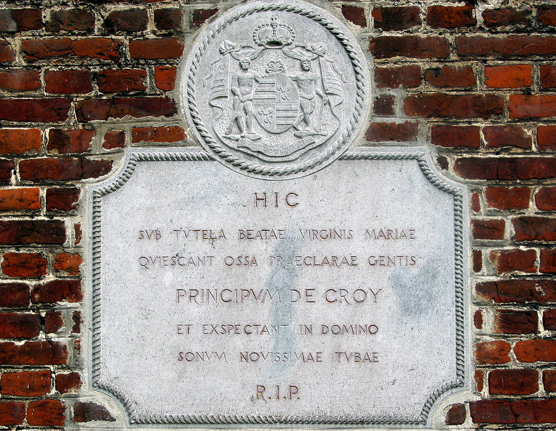 Havré (Belgique), rue Edouard Dewèze,97. - Armoiries de la famille de Croÿ et pierre sculptée portant la mention latine " HIC Sub tutela beatae virginu mariae quiescant ossa praeclarae gentis PRINCIPUM DE CROY et expectant in domino sonum novissimae tubae ".